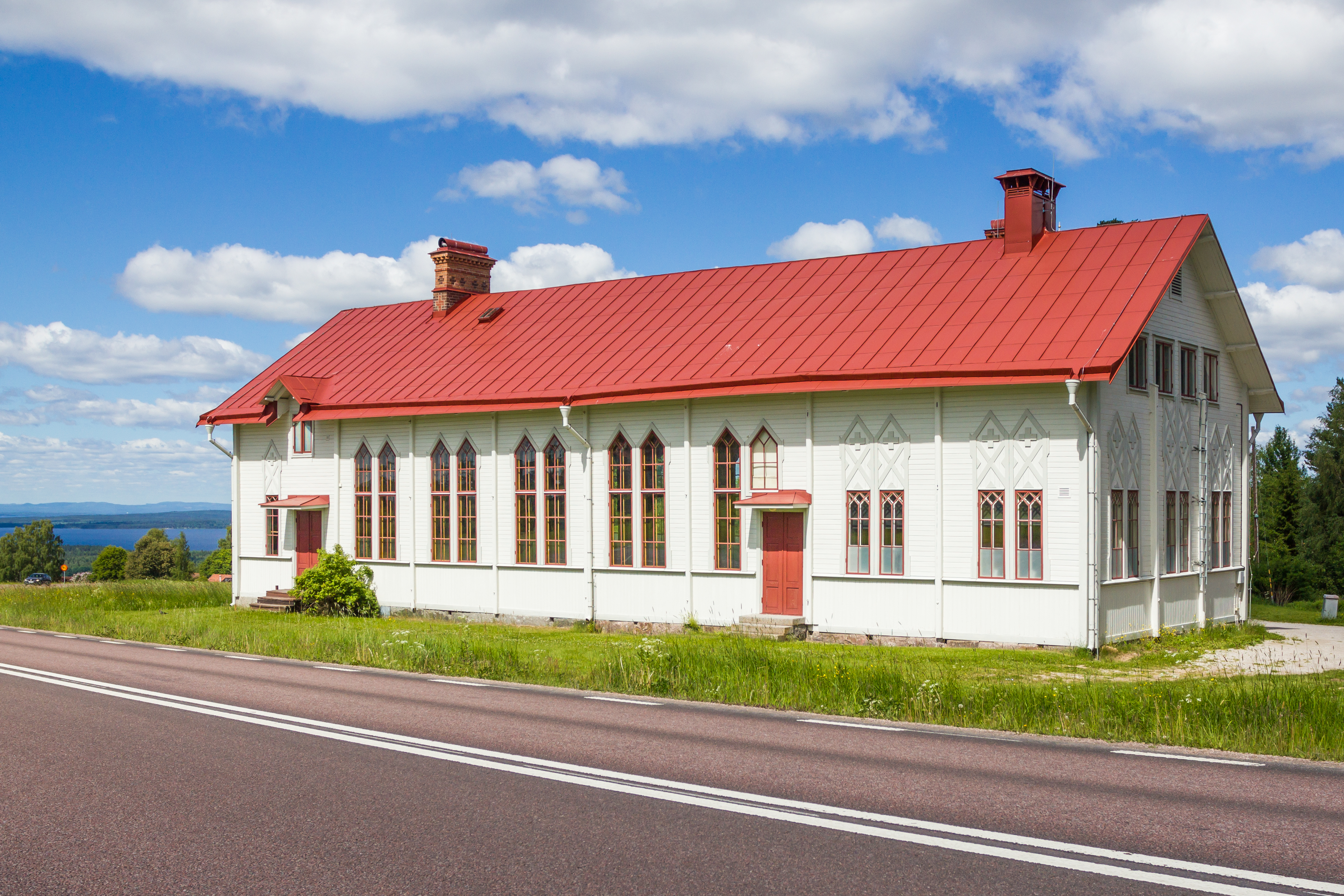 Missionshuset i Söderås (Söderås 14:18)